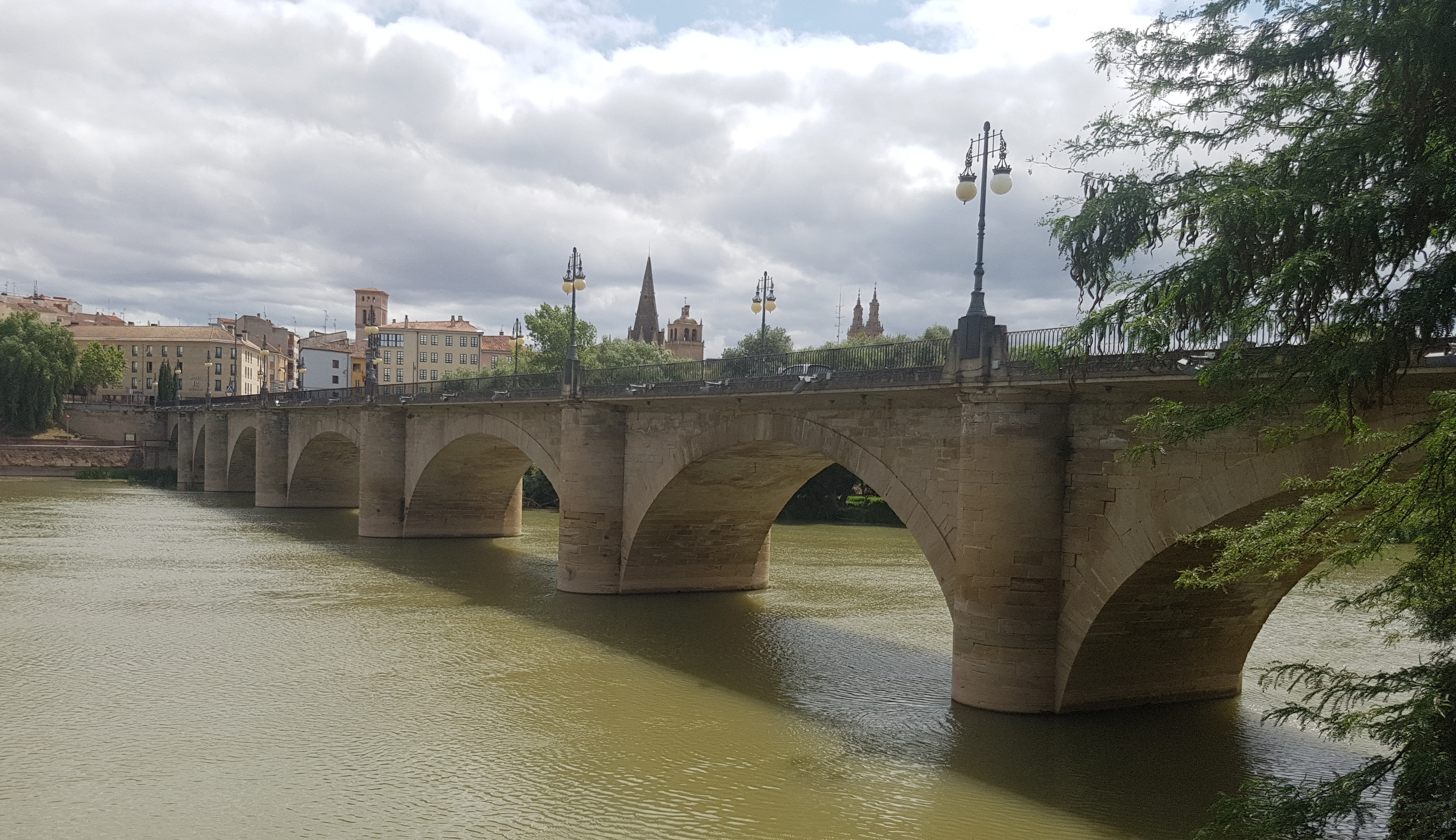 Vista de Logroño (La Rioja), con el Puente de Piedra en primer plano.